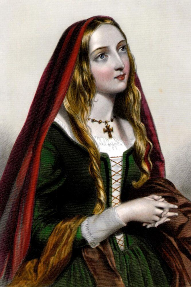 portrait de la reine Élisabeth Woodville